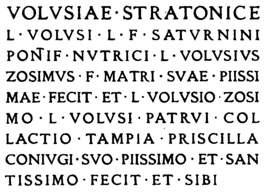 Inscription from the tomb of the Volusii Saturnini: Volusiae Stratonice L(uci) Volusi L(uci) f(ilii) Saturnini pontif(icis) nutrici L(ucius) Volusius Zosimus f(ilius) matri suae piissimae fecit et L(ucio) Volusio Zosimo L(uci) Volusi patrui collactio Tampia Priscilla coniugi suo piissimo et san(c)tissimo fecit et sibi